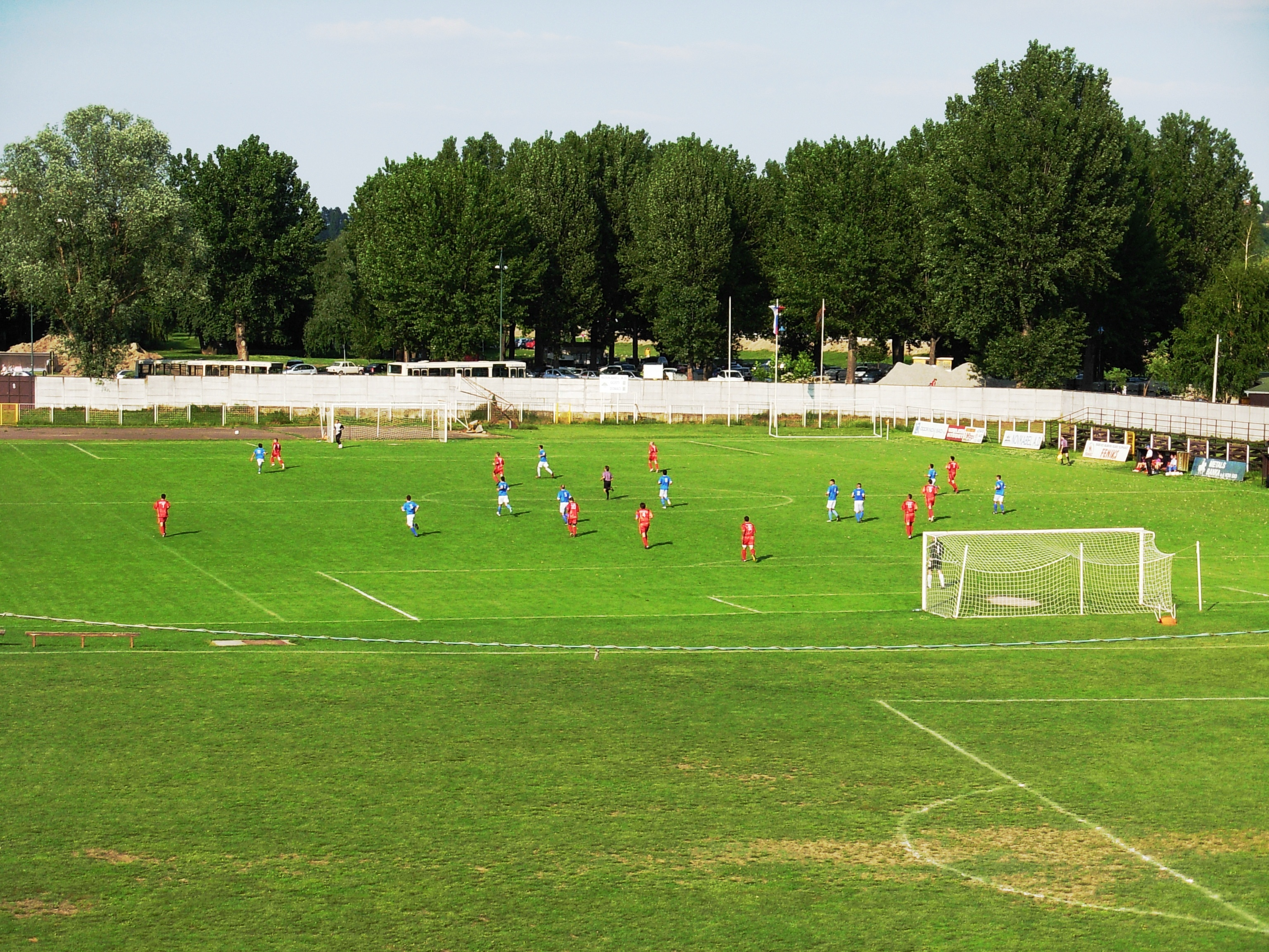 Stadion fudbalskog kluba Kabel u Novom Sadu.